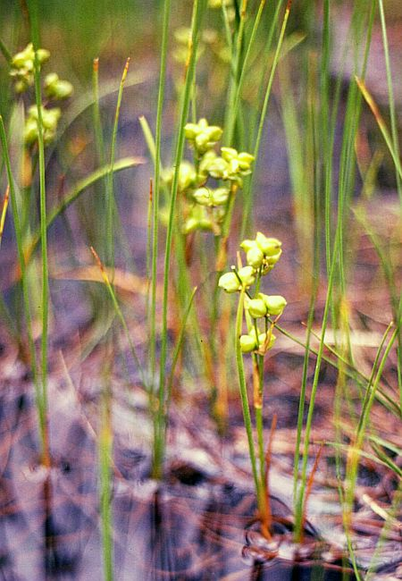 Blasensimse (Scheuchzeria palustris), Blasensimsengewächse (Scheuchzeriaceae) - Österreich/Austria/Autriche: Niederösterreich, Oberes Ybbstal, „Auf den Mösern“ SW Neuhaus